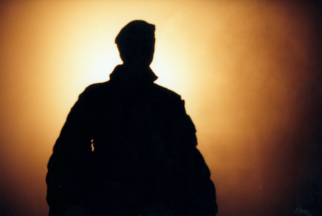 Norwegian soldier in Kosovo.